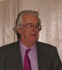 Charles Hampden-Turner Charles Hampden-Turner